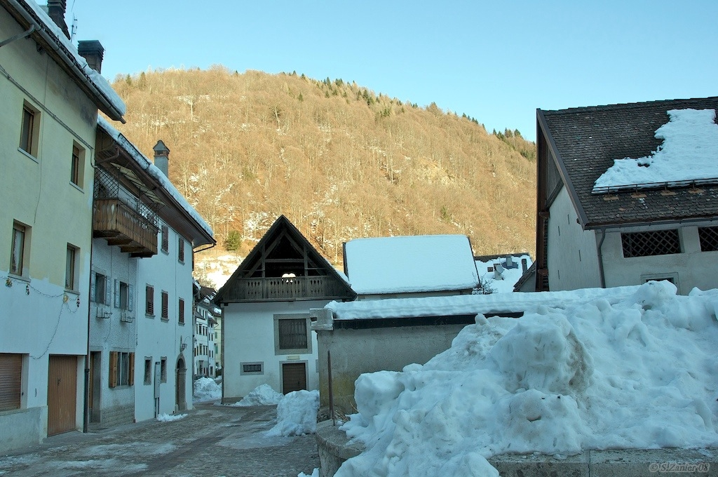 Furlan: Un borc di Pesaria